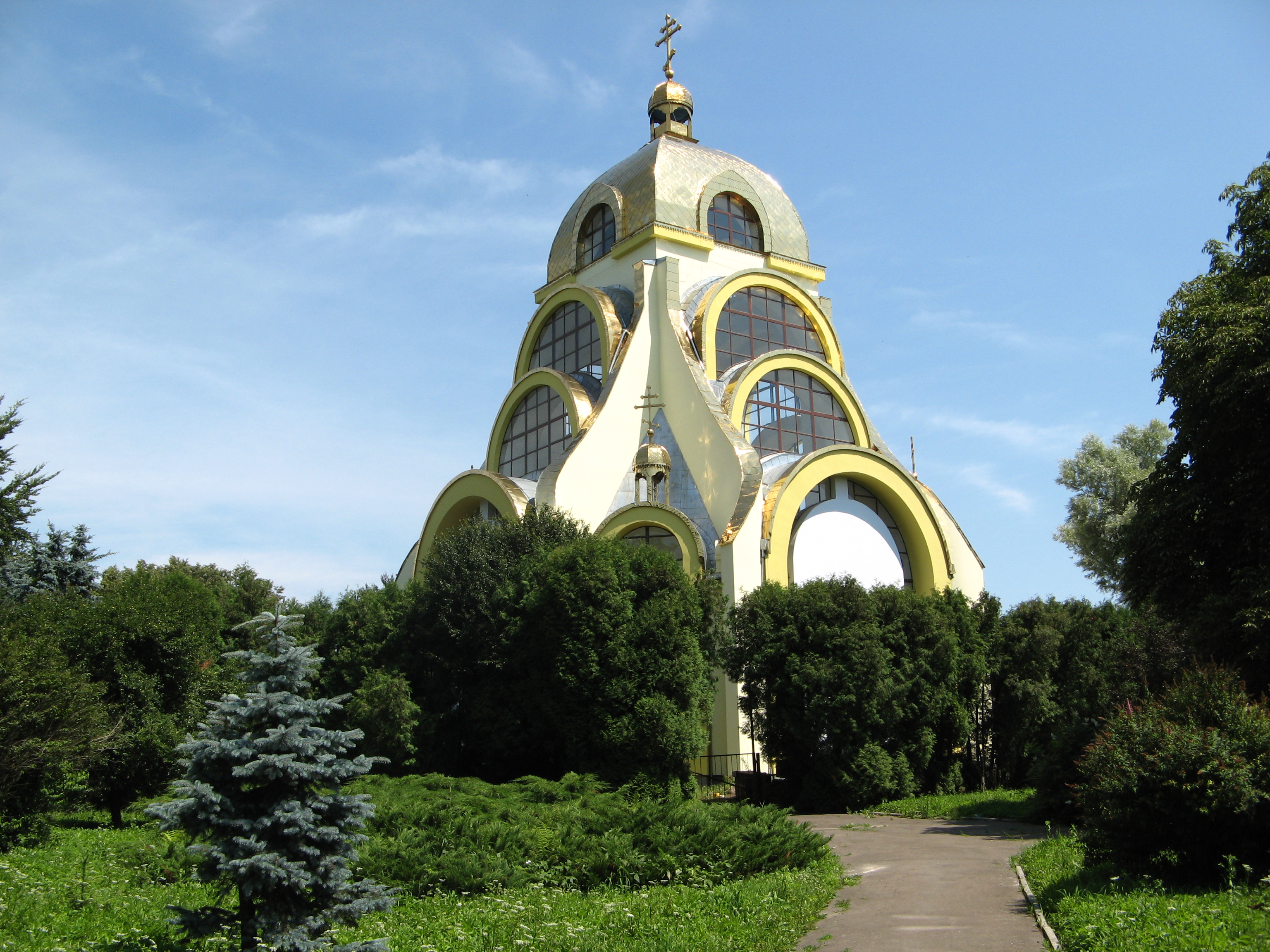 УАПЦ храм мученичів Бориса і Гліба.